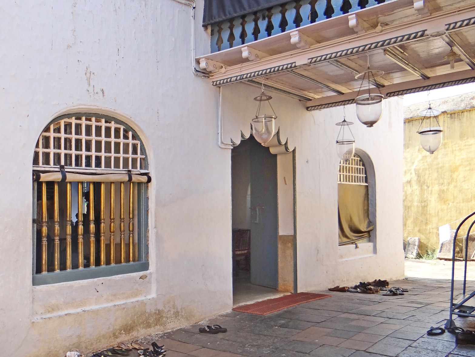 L'entrée de la synagogue les photographies sont interdites à l'intérieur Les premiers juifs seraient arrivés à Cochin après le sac de Jérusalem par les Romains (Titus) en 70. Selon les informations affichées dans un local de la synagogue, c'est parce qu'il existait des relations commerciales entre la Judée et le Kerala qu'un groupe de juifs a été accueilli à Cochin par le raja de l'époque. Par la suite, ils ont été rejoints par d'autres communautés. Article de Wikipedia sur les communautés juives en Inde La conquête de Jérusalem par les Romains (photo de l'arc de triomphe deTitus dans le forum romain par dalbera) Il n'y a pratiquement plus de juifs à Cochin aujourd'hui car la quasi totalité est partie en Israel.